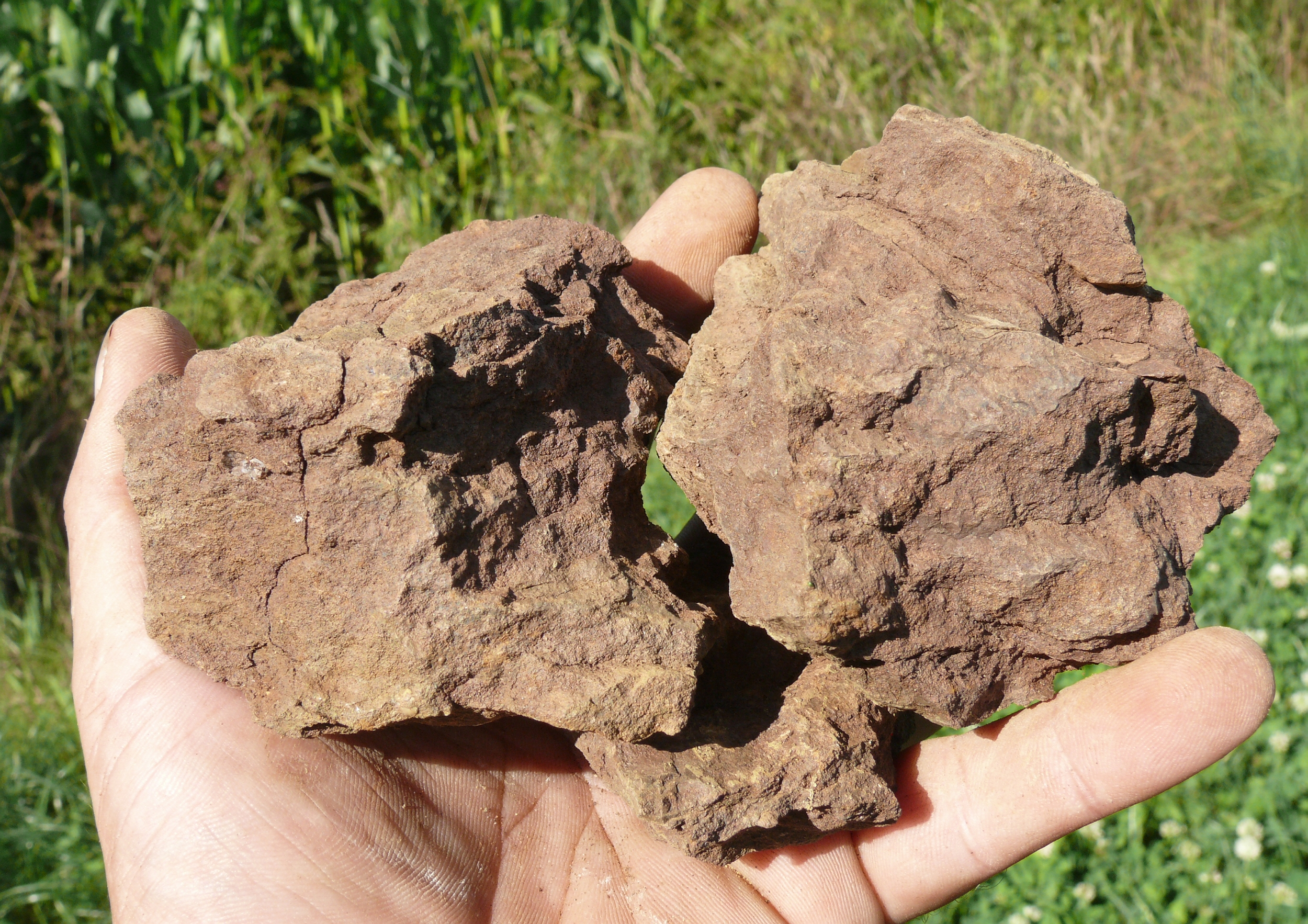 Bruchstücke des Unteren Flöz aus dem Eisensandstein Alter Steinbruch bei Lauchheim